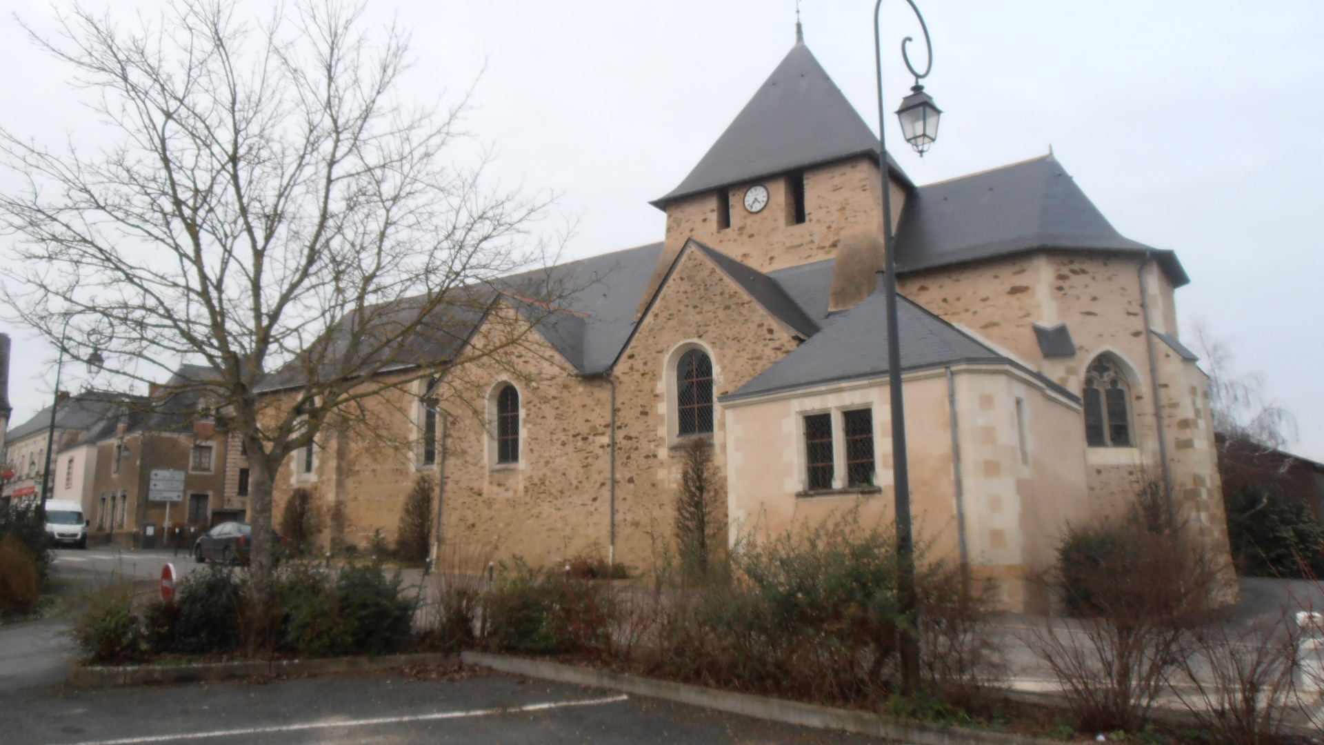 l'église de la commune de marigné